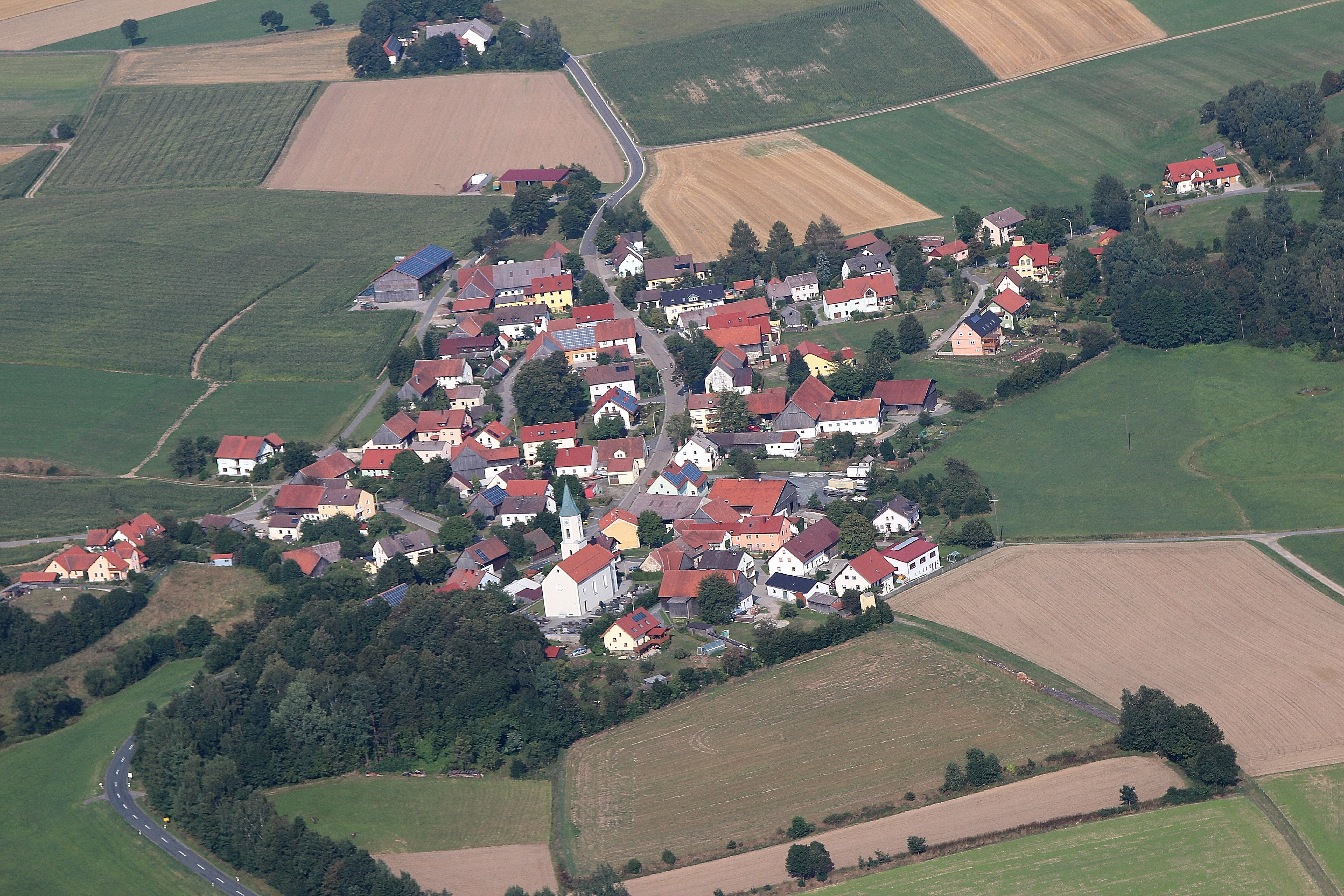 Wildeppenried ist ein Ortsteil von Oberviechtach, Landkreis Schwandorf, Oberpfalz, Bayern